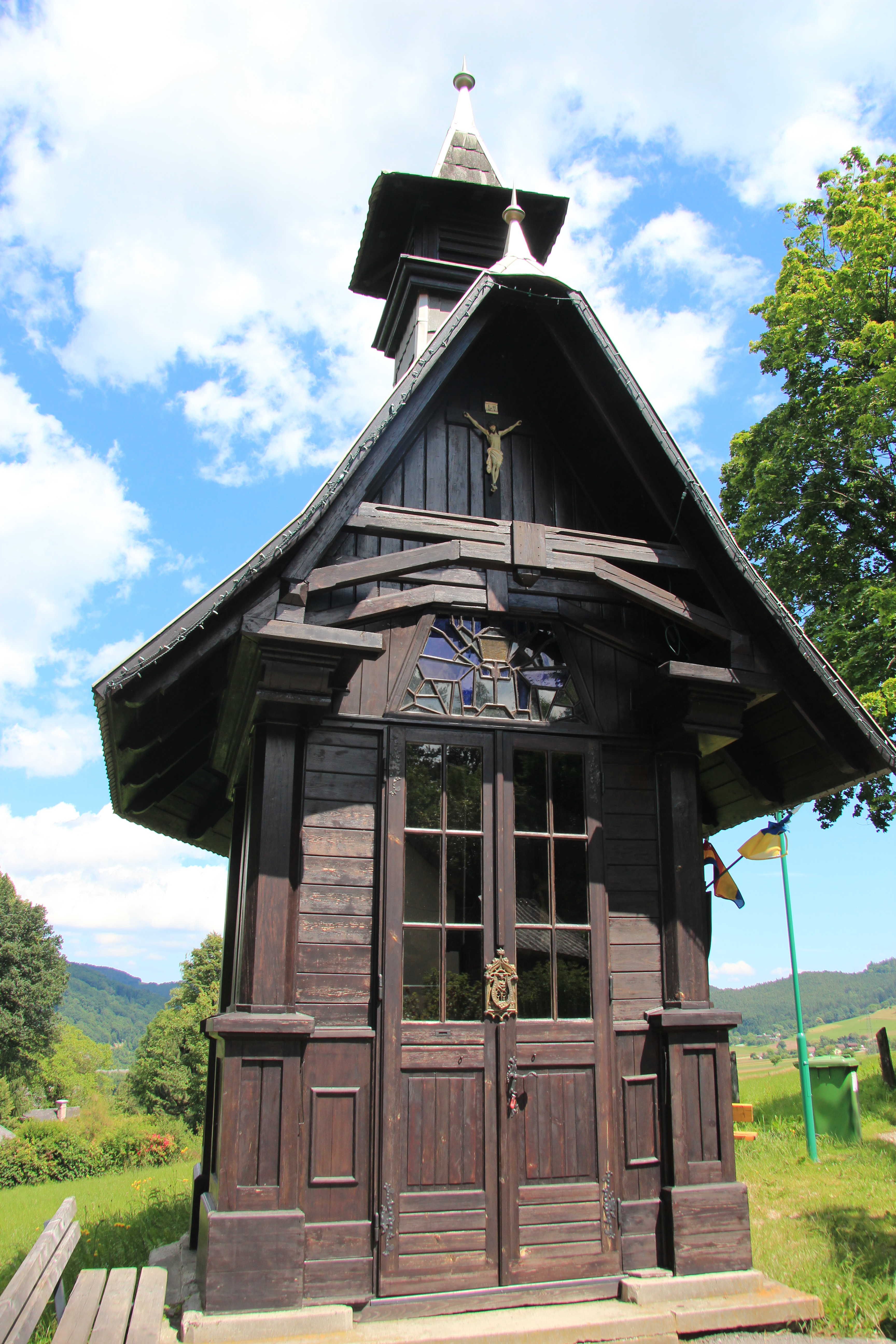 Barbarakepelle in Küb, Payerbach